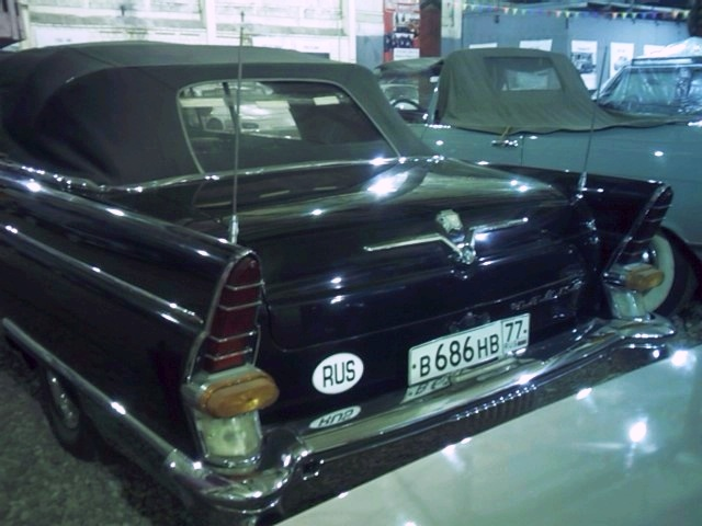 Фаэтон ГАЗ-13 «Чайка» в «Музее ретроавтомобилей» в Москве на Рогожском Валу. Вид сзади